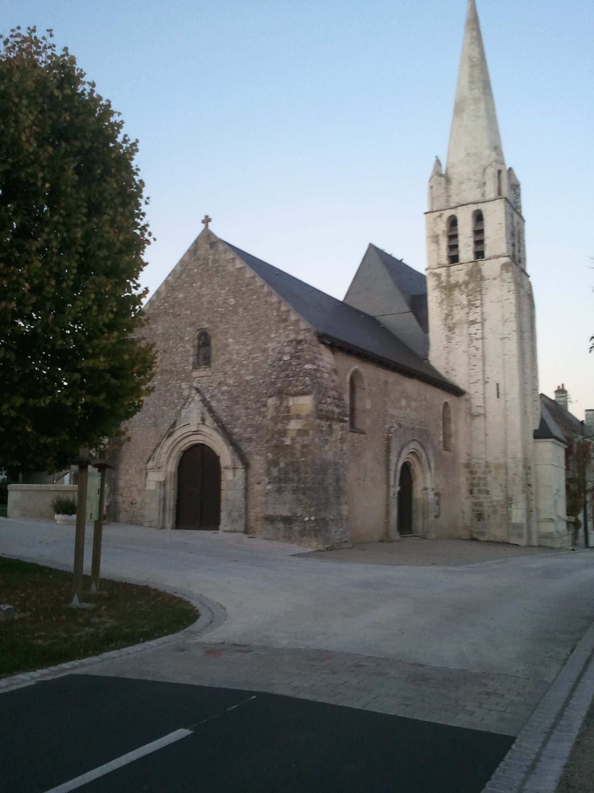 Eglise Saint-Quentin de Saint-Quentin-sur-Indrois .